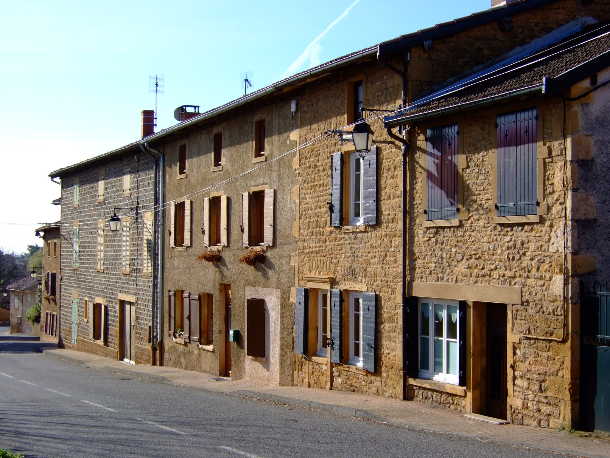 Le village de Frontenas